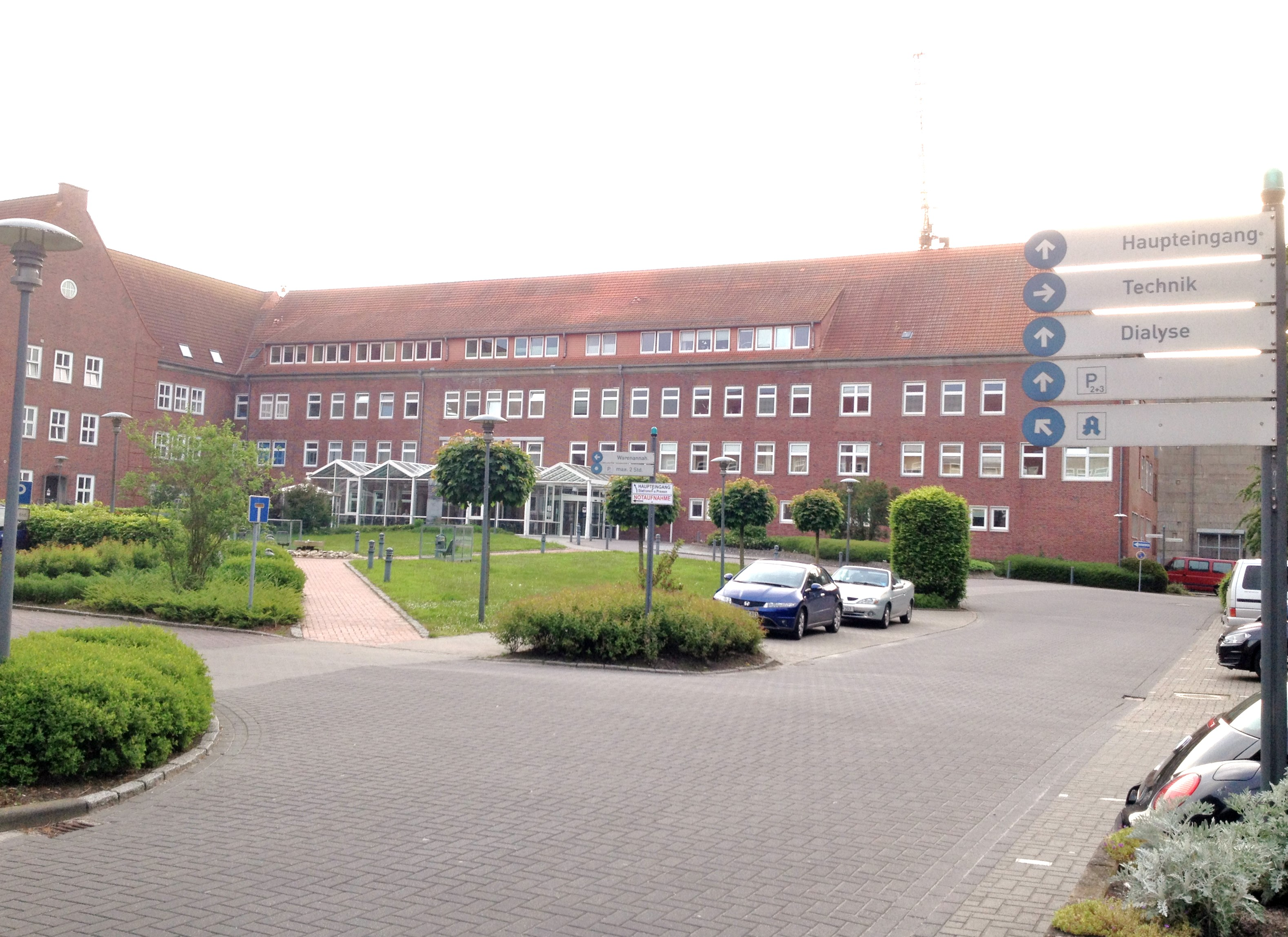 Nordwest-Krankenhaus Sanderbusch (Sande, Niedersachsen, Deutschland)